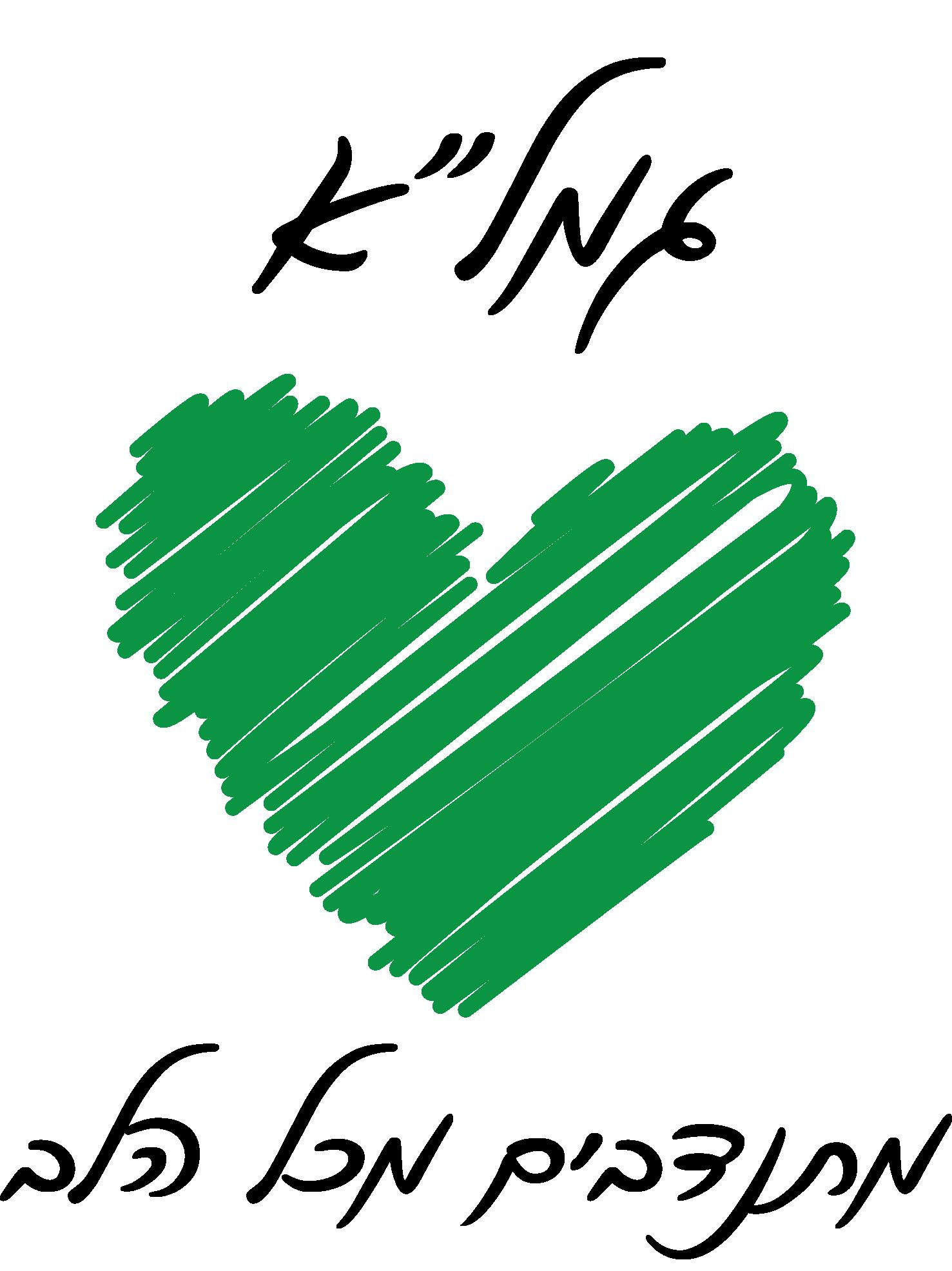 הסמליל של פרויקט גמל"א